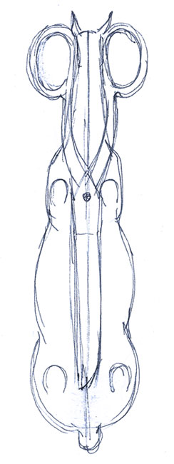 scherkraft links